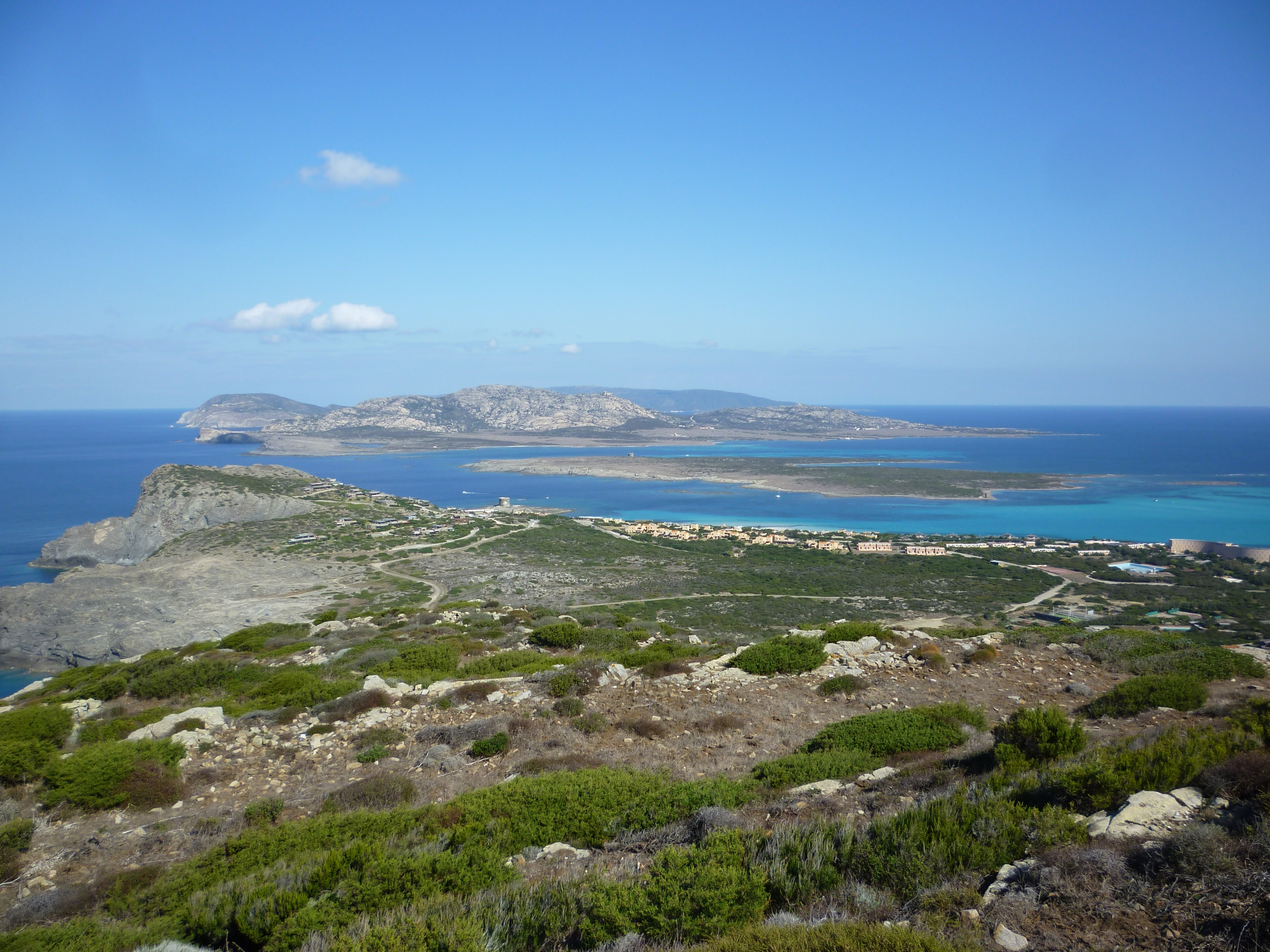 Capo Falcone e l'isola dell'Asinara visti dalla torre del Falcone